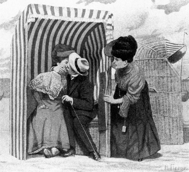 szene im strandkorb